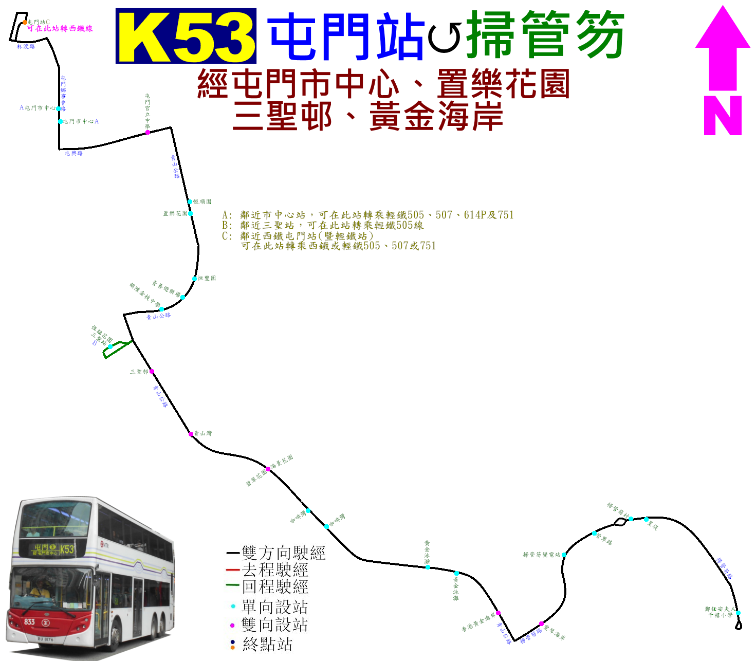 中文（香港）: 港鐵巴士K53線的地圖式路線圖